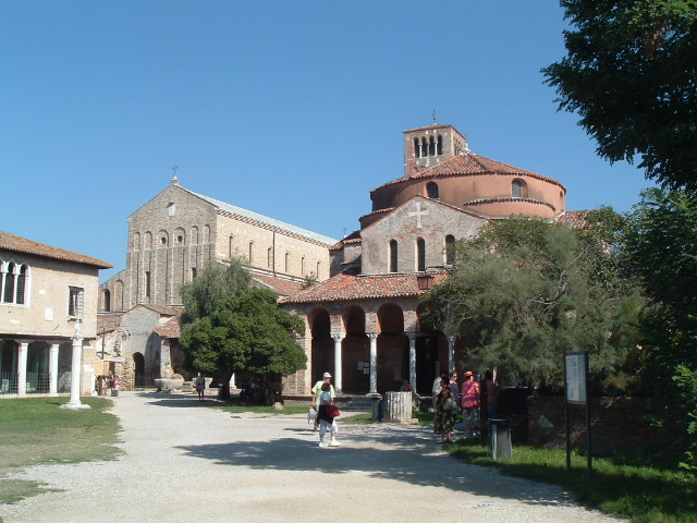 Torcello templomai